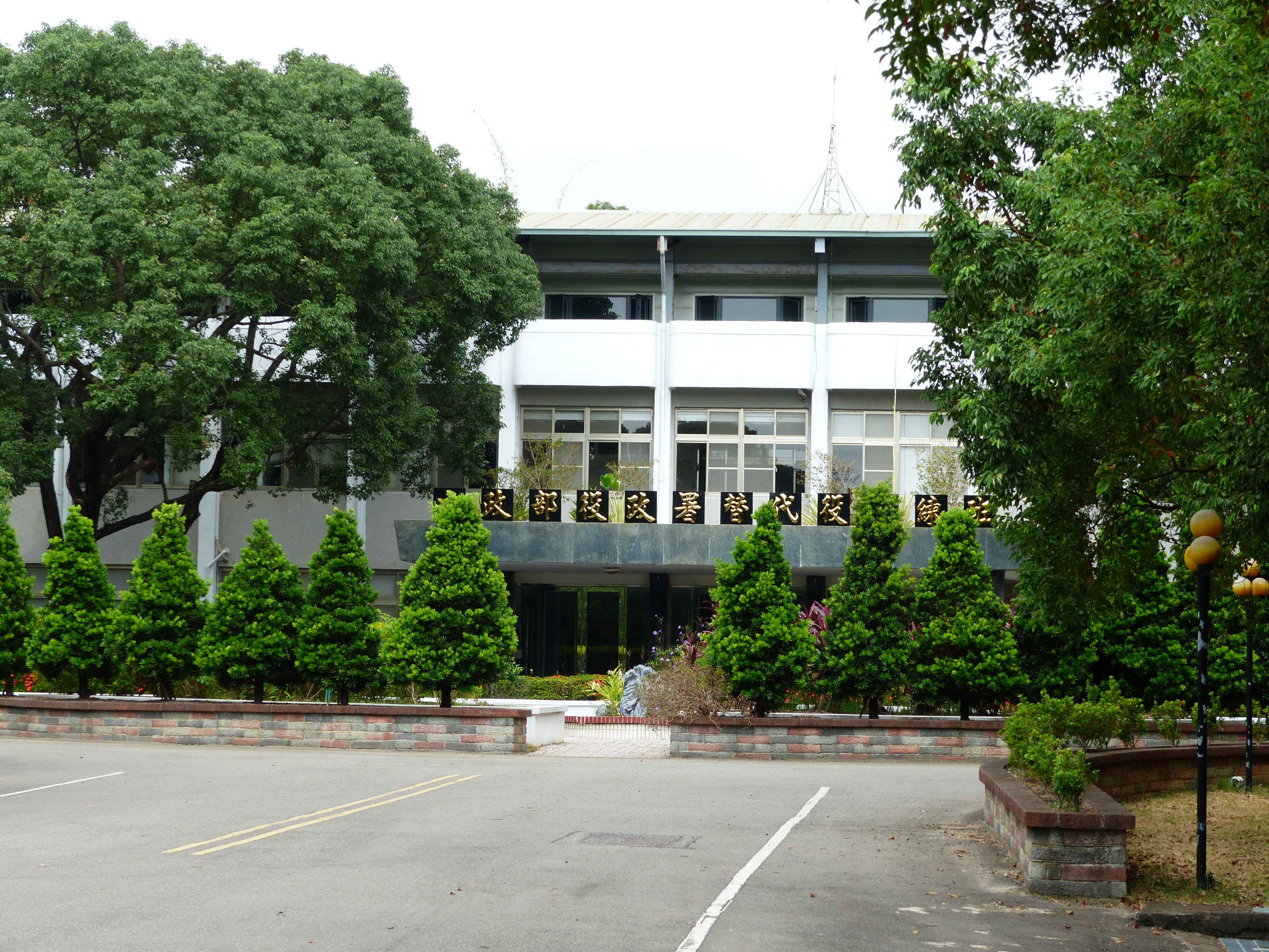 成功嶺的內政部役政署替代役訓練班班本部。